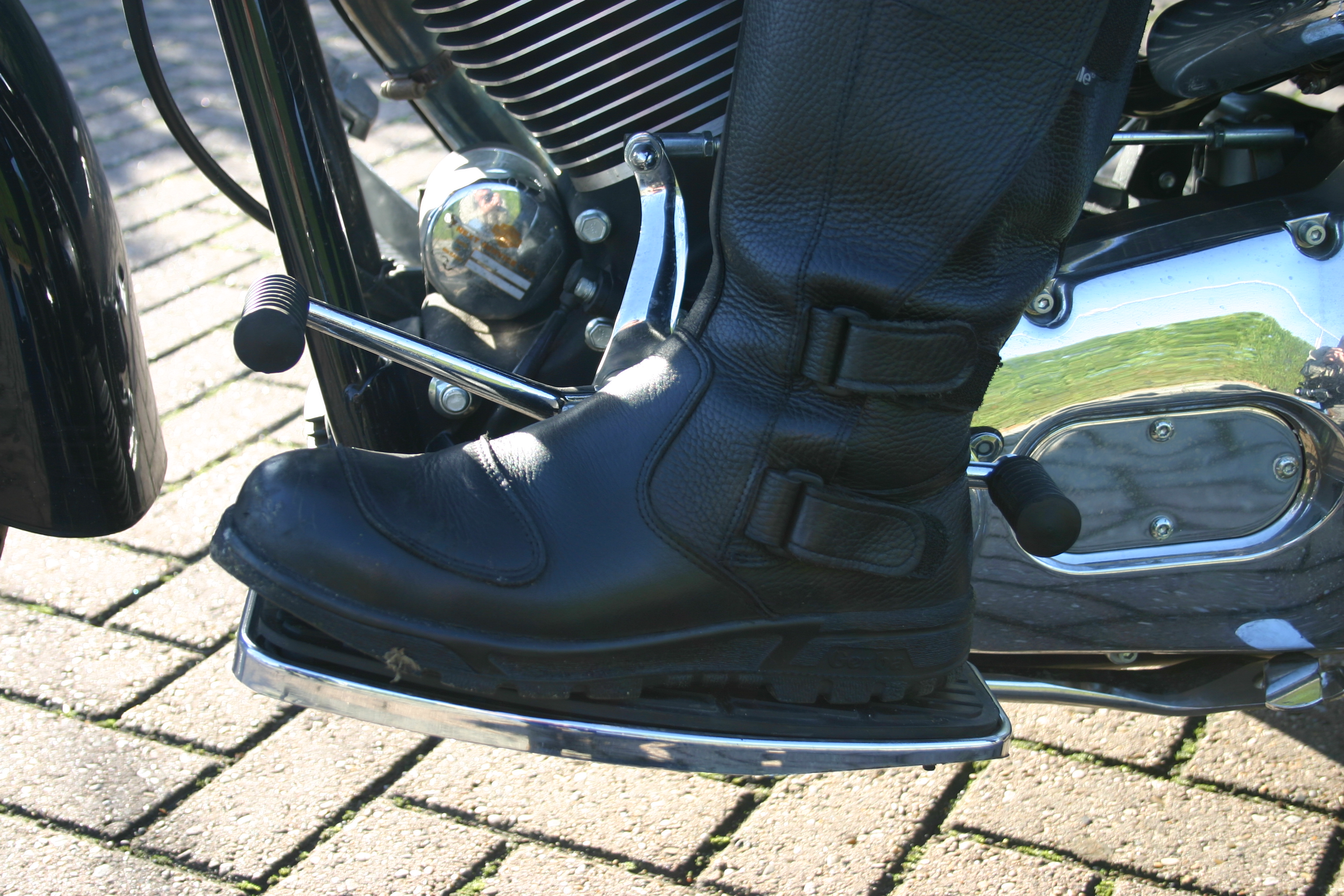 Treeplank. Hak-teen schakeling.